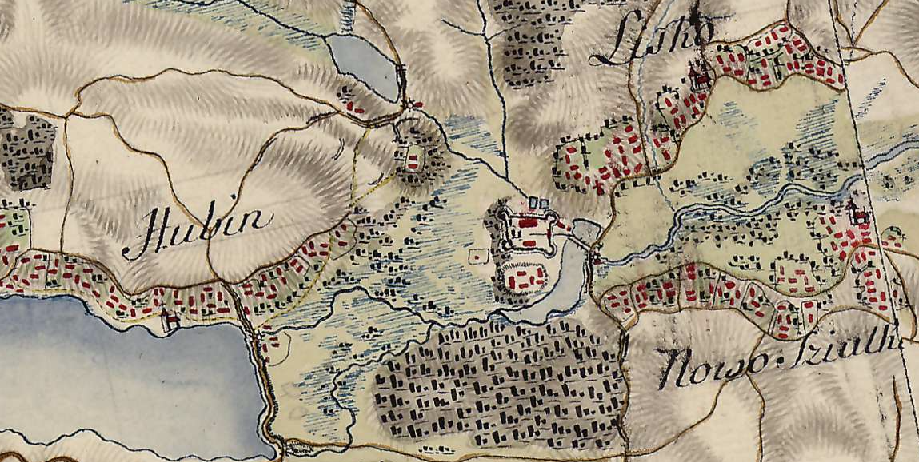 fortxviii